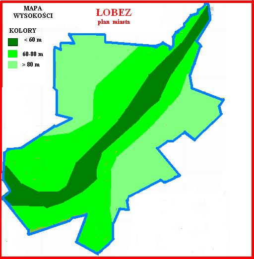 Łobez – granice miasta